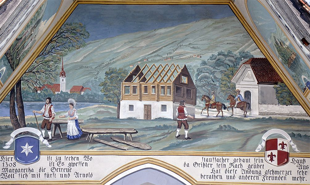 Werner Stauffacher baut sein Haus. Fresko über dem Eingang der Stauffacherkapelle in Steinen. Das Fresko stammt ursprünglich aus dem 18. oder 19. Jh., wurde aber um 1900 übermalt und 1979/80 wiederhergestellt/rekonstruiert. Das alte Gemälde ist noch sichtbar auf diesem Foto von 1890. Die Inschrift ist erwähnt in Eduard Osenbrüggen, Die Urschweiz (1872), p. 31: Hier ist zu sechen Wo Stauffacher gebaut sein Hausz 1308 ist Es gewessen da Geissler sein Rach geübet Aus. Margaretha die Getreue hat diese Andung gschmerzet sehr Wolt sich mit fürst und Arnold berathen und andern Freunden mehr. Von da fengt An die Freyheit zleben So unsere Väter gebracht zu Wegen Und wir geniesen die selbe in frid und Ruoh Söhne seyd dankbar und schaut Wohl dar zu Der Kirchturm von Steinen ist mit seinem Kuppelspitzhelm von 1740 dargestellt. Die Übermalung ist dargestellt auf alten Postkarten ab etwa 1900: [1] [2] [3] [4][5][6]